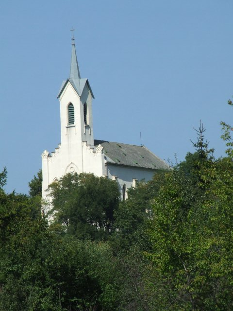 Lókúti római katolikus templom, Veszprém megye